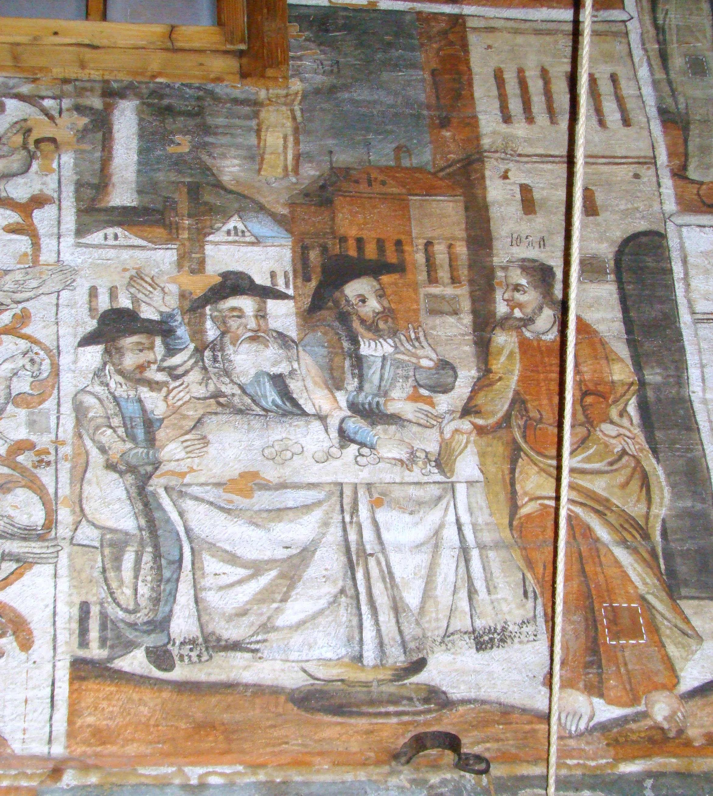 Biserica de lemn "Sf. Arhangheli", oraș Borșa, Str. Eternității 1